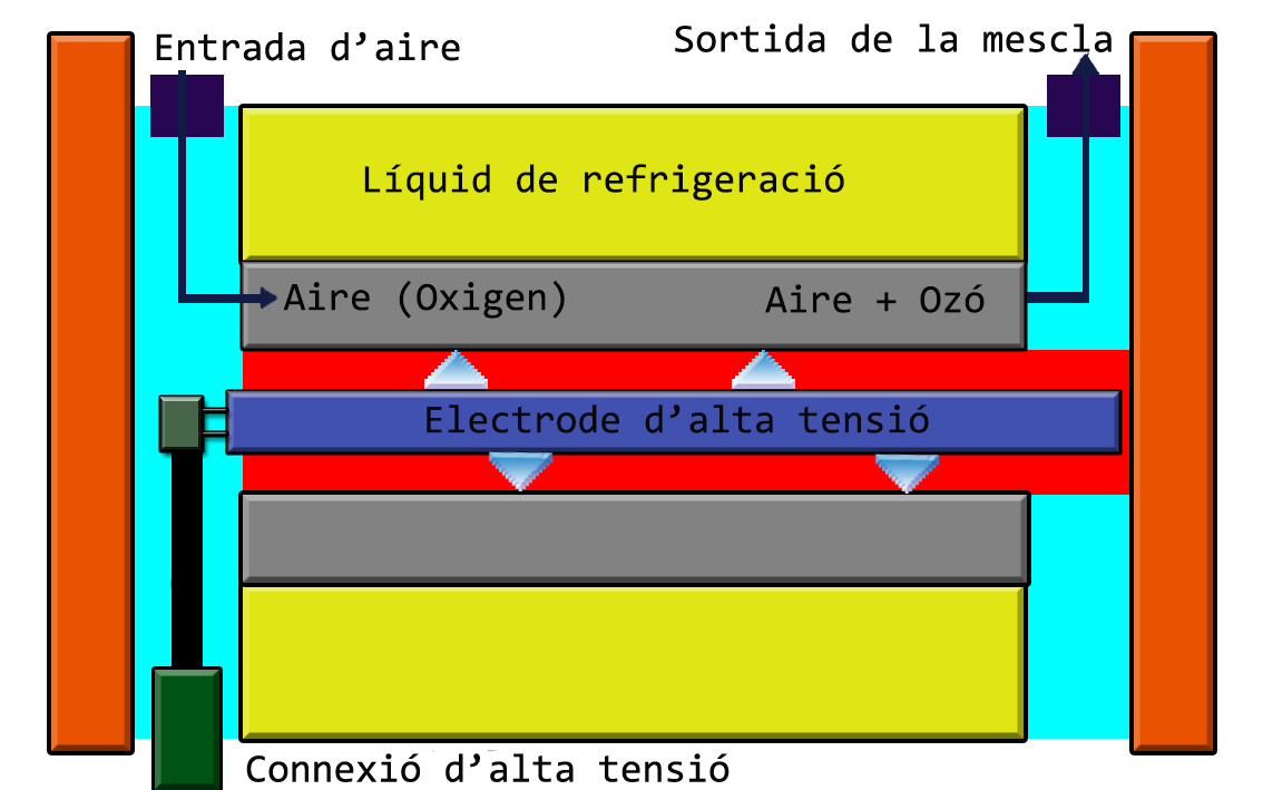 Funcionament d'un ozonitzador